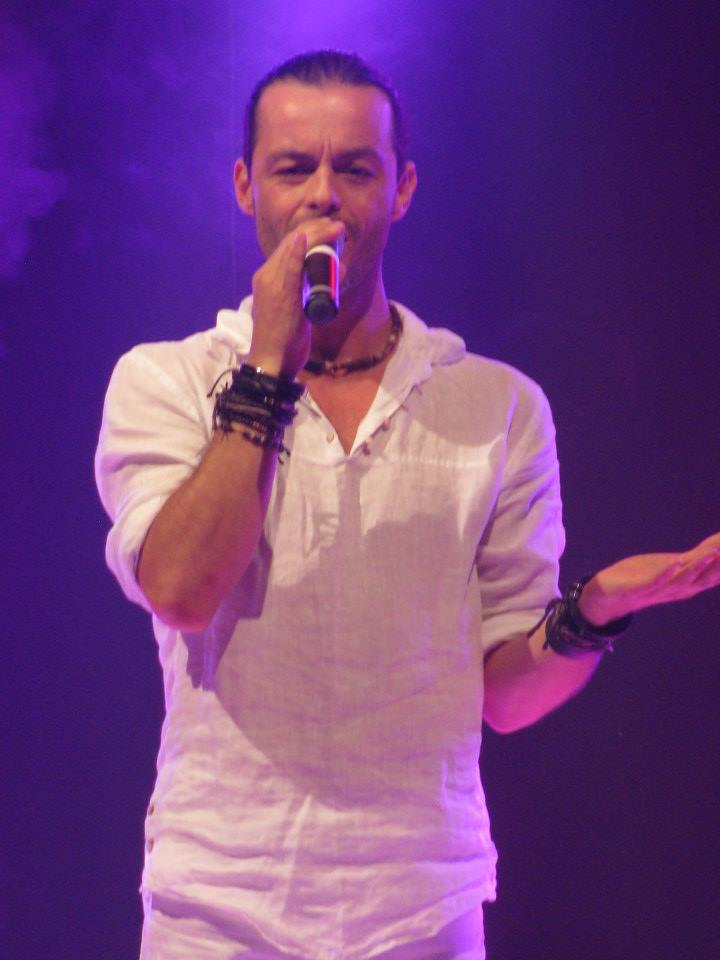 Nuno Resende à Equihen en août 2013 pendant la tournée Mona FM